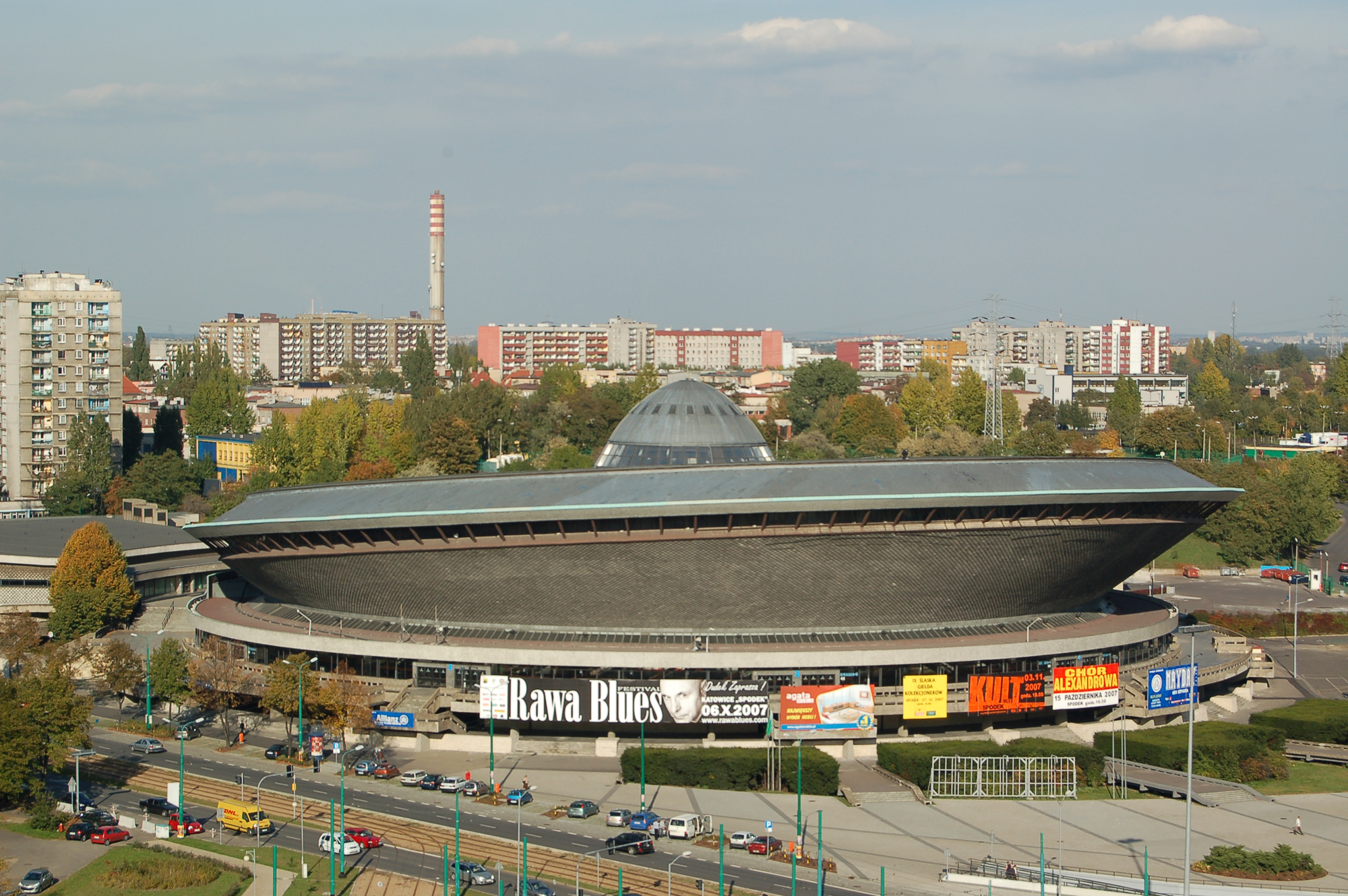 Spodek